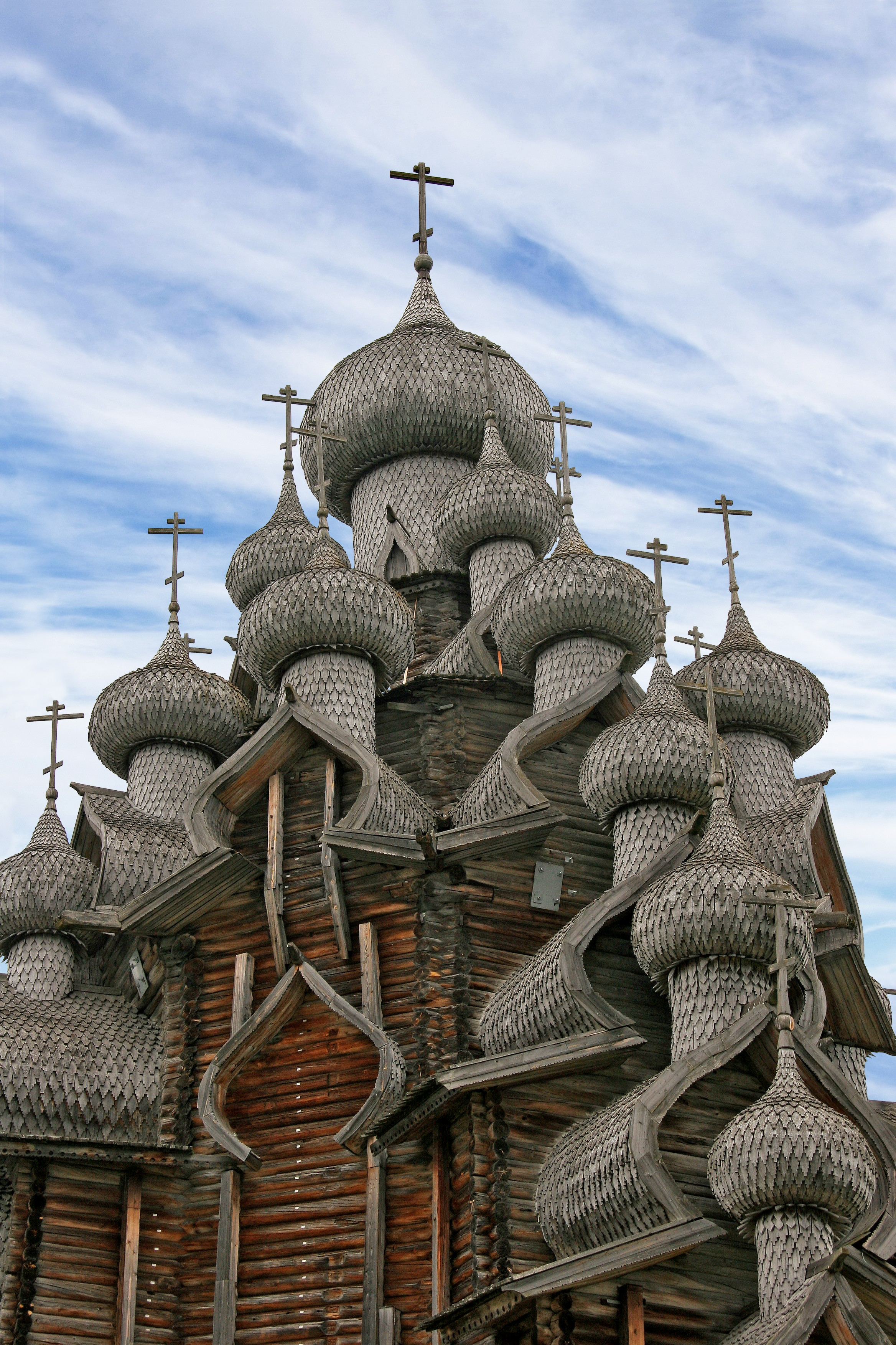 Охранная зона музея-заповедника 'Кижи': Остров в заливе Малое Онего Онежского озера, Кижи, Медвежьегорский район, Карелия This image is related to the protected area of Russia number 1010088